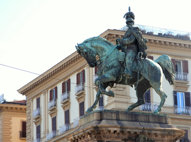 Naples: statue équestre de Victor-Emmanuel II (en italien Vittorio Emanuele II)